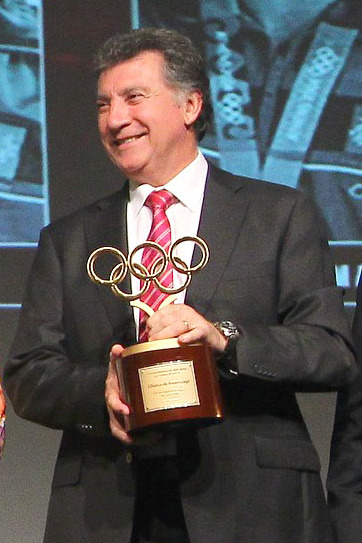 En el centro de Eventos Casapiedra el Comité Olímpico de Chile encabezado por su presidente Neven Ilic, realizó una gala de celebración de sus 80 años. A la ceremonia asistió la Ministra de Deportes Natalia Riffo, la Subsecretaria Nicole Sáez y el Director nacional del IND Ricardo Loyola. Santiago, Chile 20/11/2014 Foto: Max Montecinos/IND